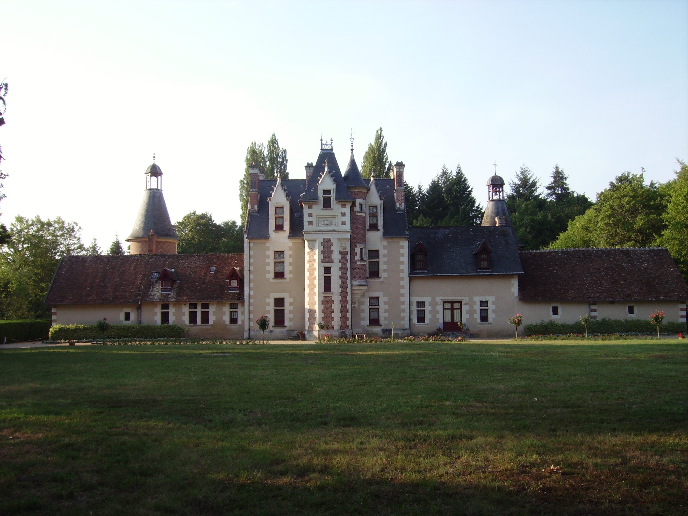 Château of Troussay, France. Louis 12ve façade. Château de Troussay, France, Loir et Cher. Façade Louis XII.